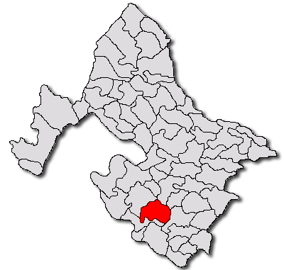 Categorie:Hărţi ale judeţului Mehedinţi